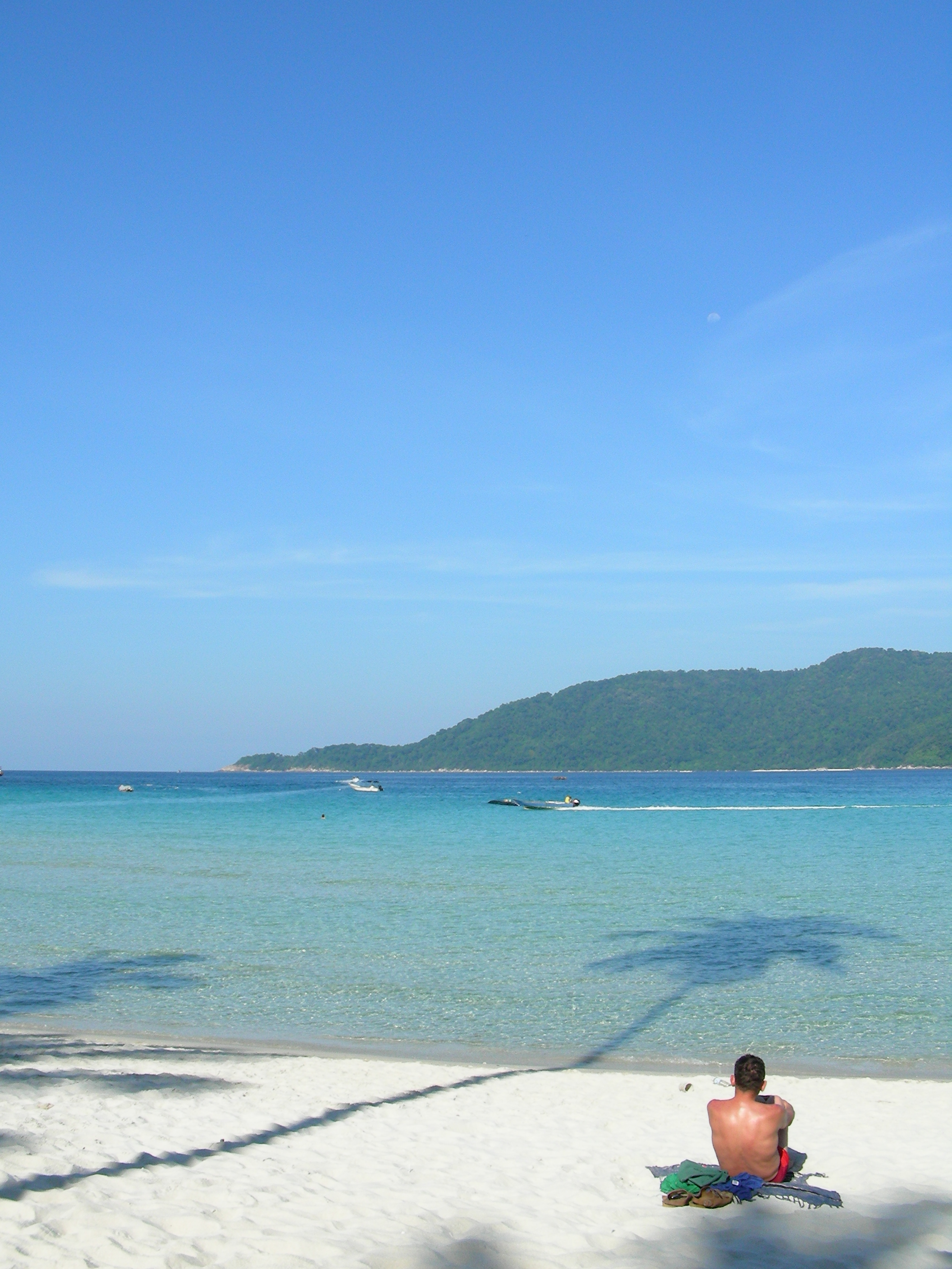 Pulau Perhentian, Malaysia